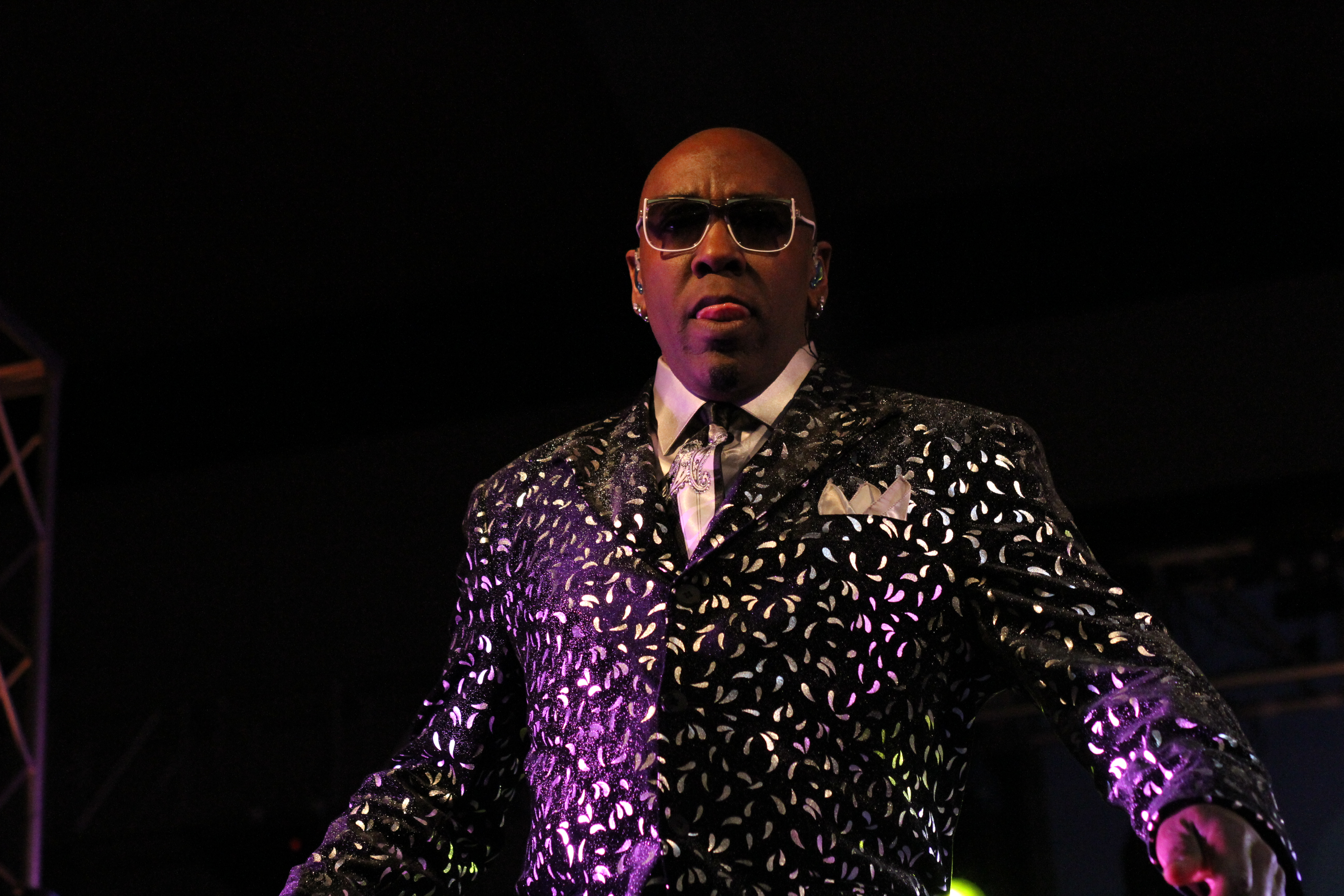 By Amanda Rhoades